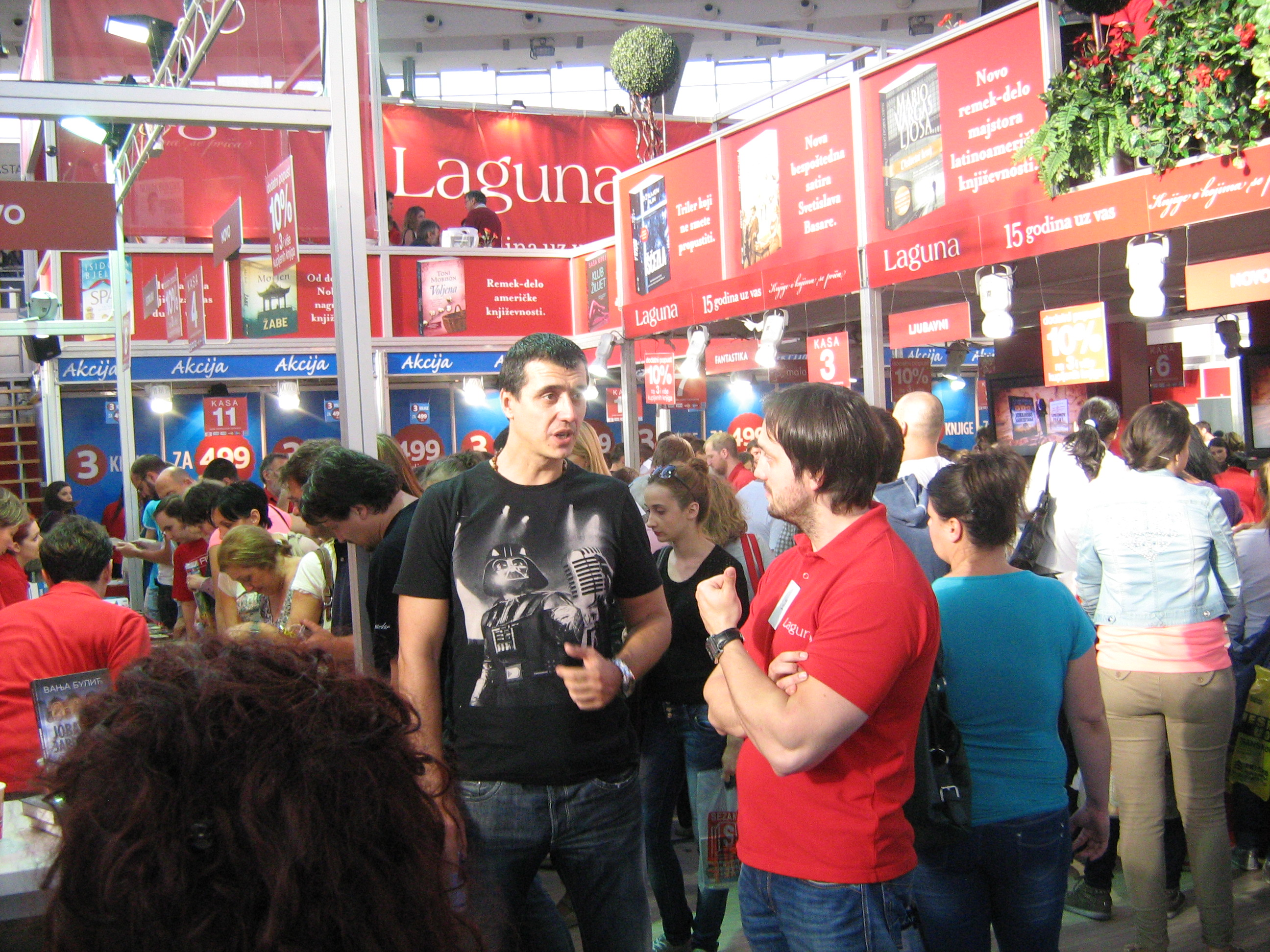 Марко Булат на Сајму књига 2013. године